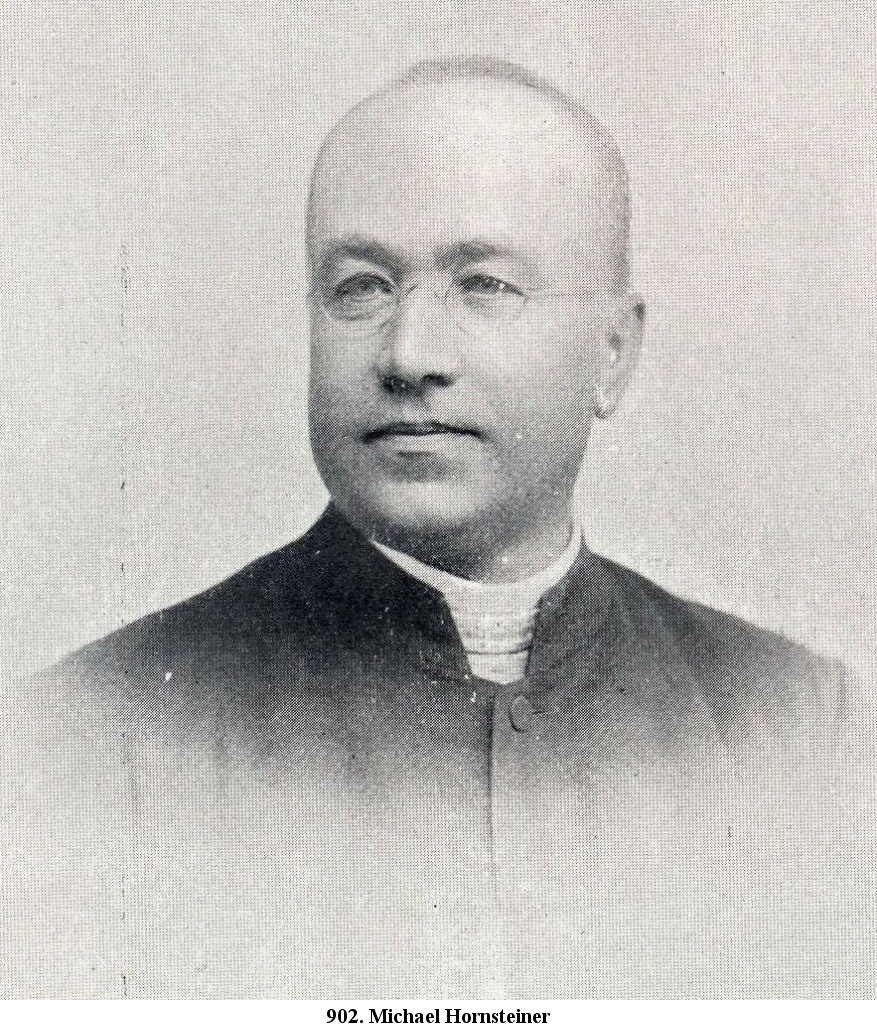 Michael Hornsteiner (1839-1902), český římskokatolický kněz německého původu a kanovník Metropolitní kapituly u sv. Víta v Praze